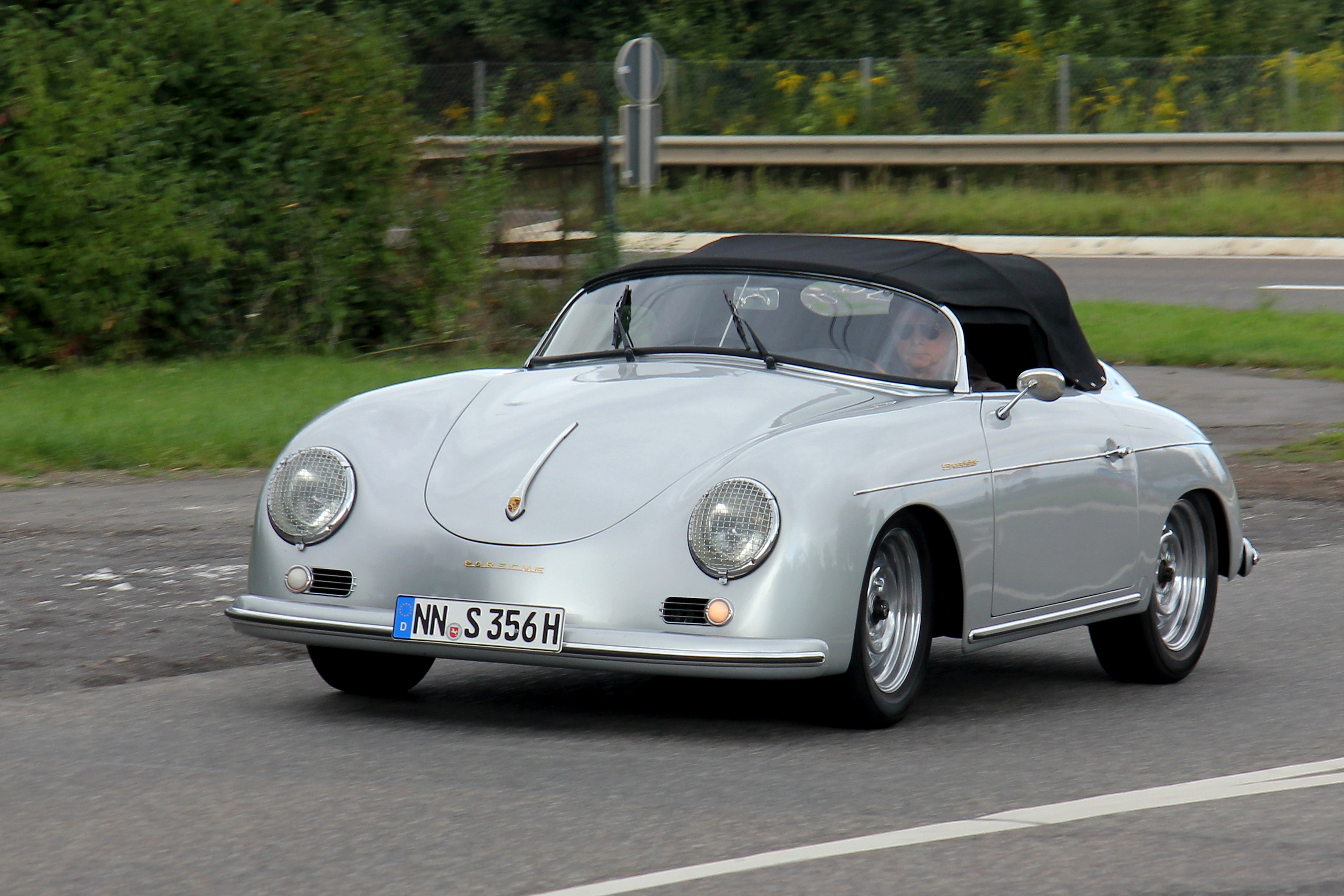 Porsche 356 A Speedster 1600 Super, 75 PS bei 5000/min, gebaut von 1955 bis 1959. Das Bild zeigt den Wagen bei einer Oldtimerveranstaltung. Amtliches Kennzeichen verändert.